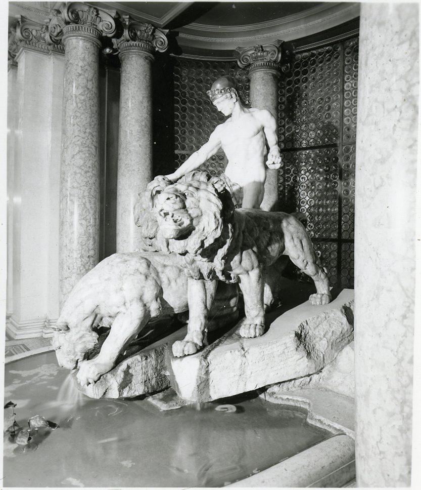 Servizio fotografico : Trieste, 1964 / Paolo Monti. - Fototipi: 3 : Positivo b/n, gelatina bromuro d'argento/ carta, provino a contatto da pellicola 10x12. - ((La suddetta serie è contenuta nella scatola dei contatti identificata con il n. 145; sul coperchio iscrizione documentaria manoscritta a pennarello nero: "Contatti/ 7d". - Confronta scheda G08045-8091. - Fonte: Agenda di Paolo Monti: R 1 - Monti/ 1 aprile 1963 - 6 giugno 1964/ 6000-8193 (1963-1964), presso Archivio Paolo Monti